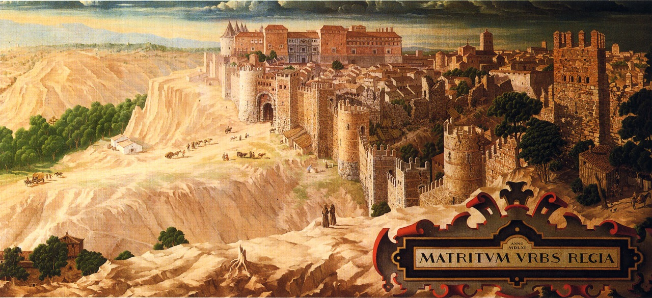 Recreación imaginaria del Madrid de mediado el siglo XVI, pintada en 1956 por Pierre Schild para el Ayuntamiento de Madrid y adquirida por la familia González para el Restaurante Casa Botín de Madrid.